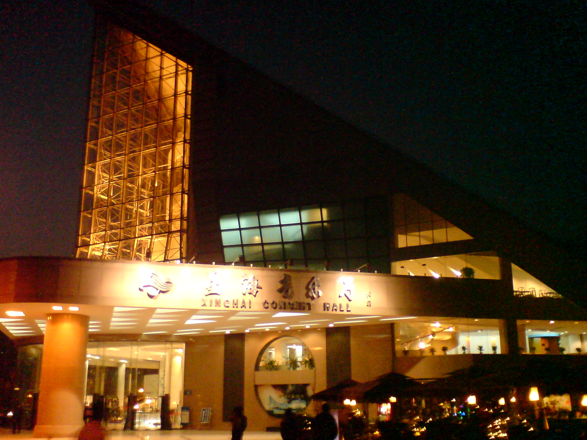 星海音乐厅